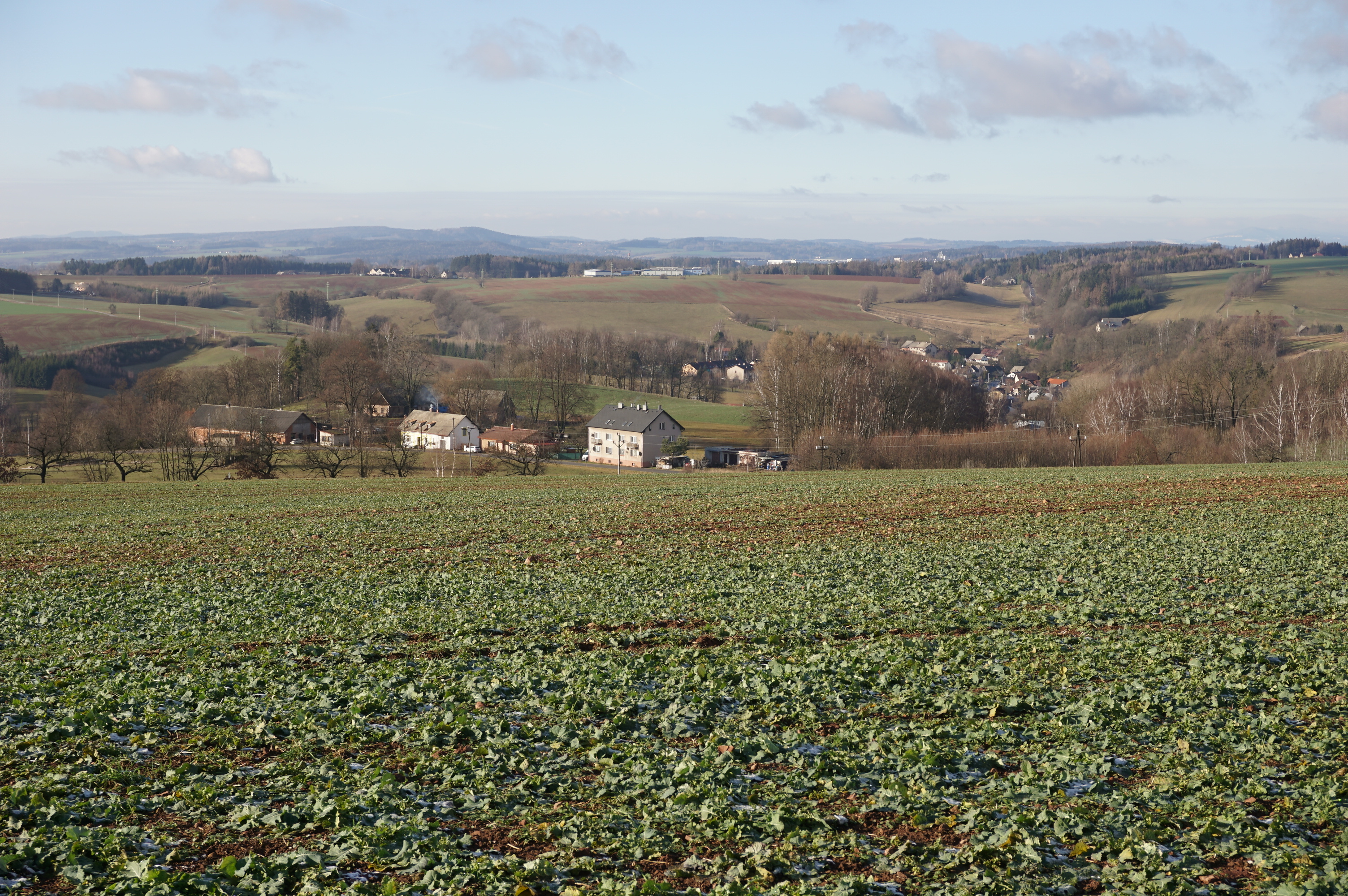 Slavíkov (u Náchoda) - pohled na osadu od rozhledny Na Signálu na osadu (vpředu domy čp. 1, 35, 43 a 40)